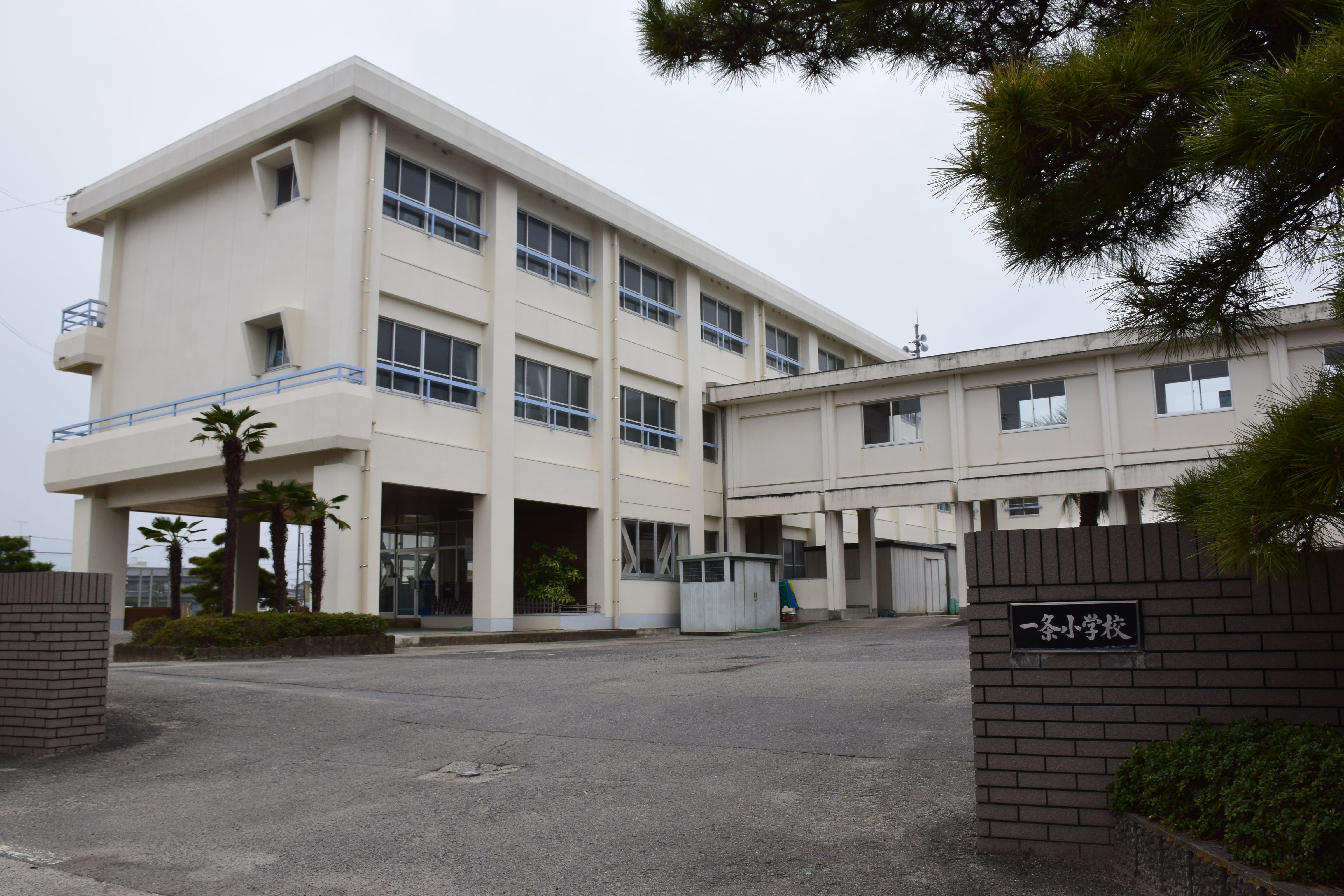 阿波市立一条小学校